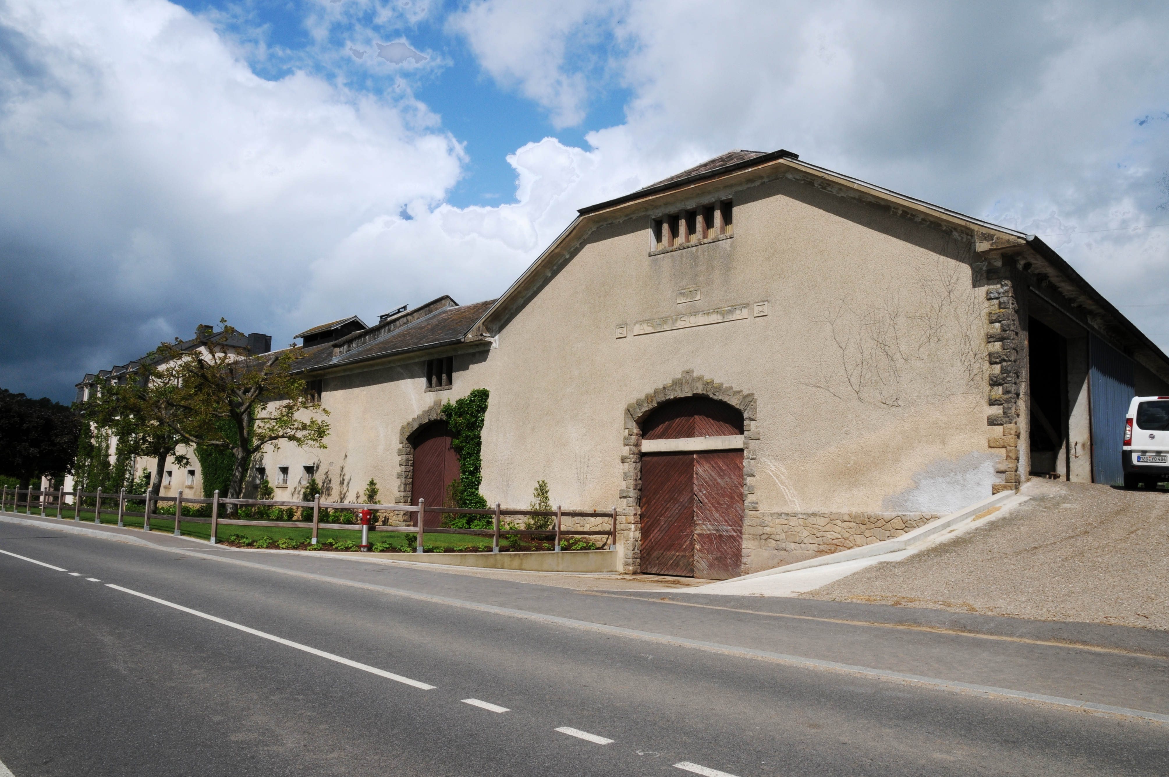 Den Aasselscheierhaf zuAasselscheier.